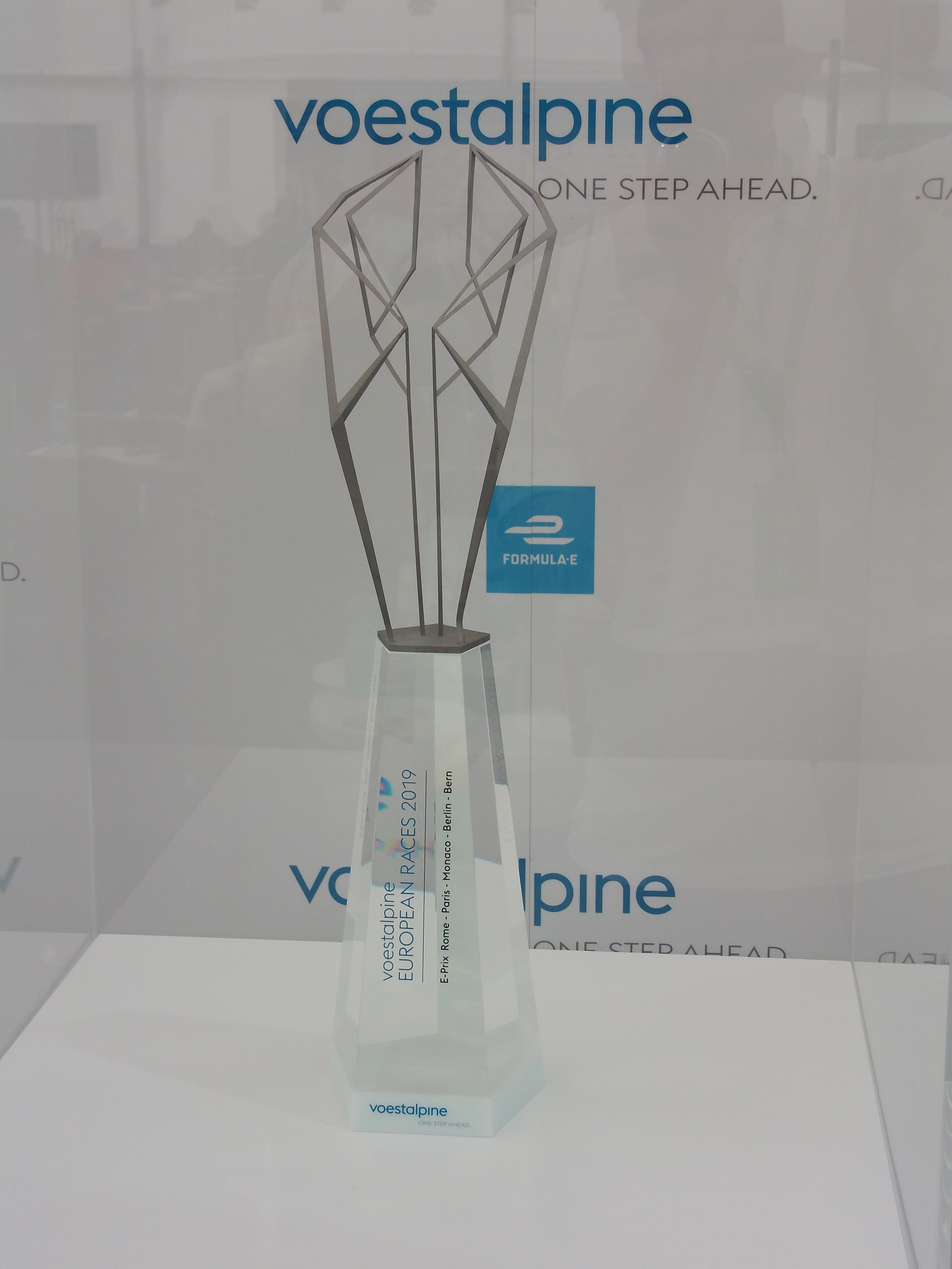 Die Trophäe zu den voestalpine European Races 2019, fotografiert im Rahmen des Berlin E-Prix 2019